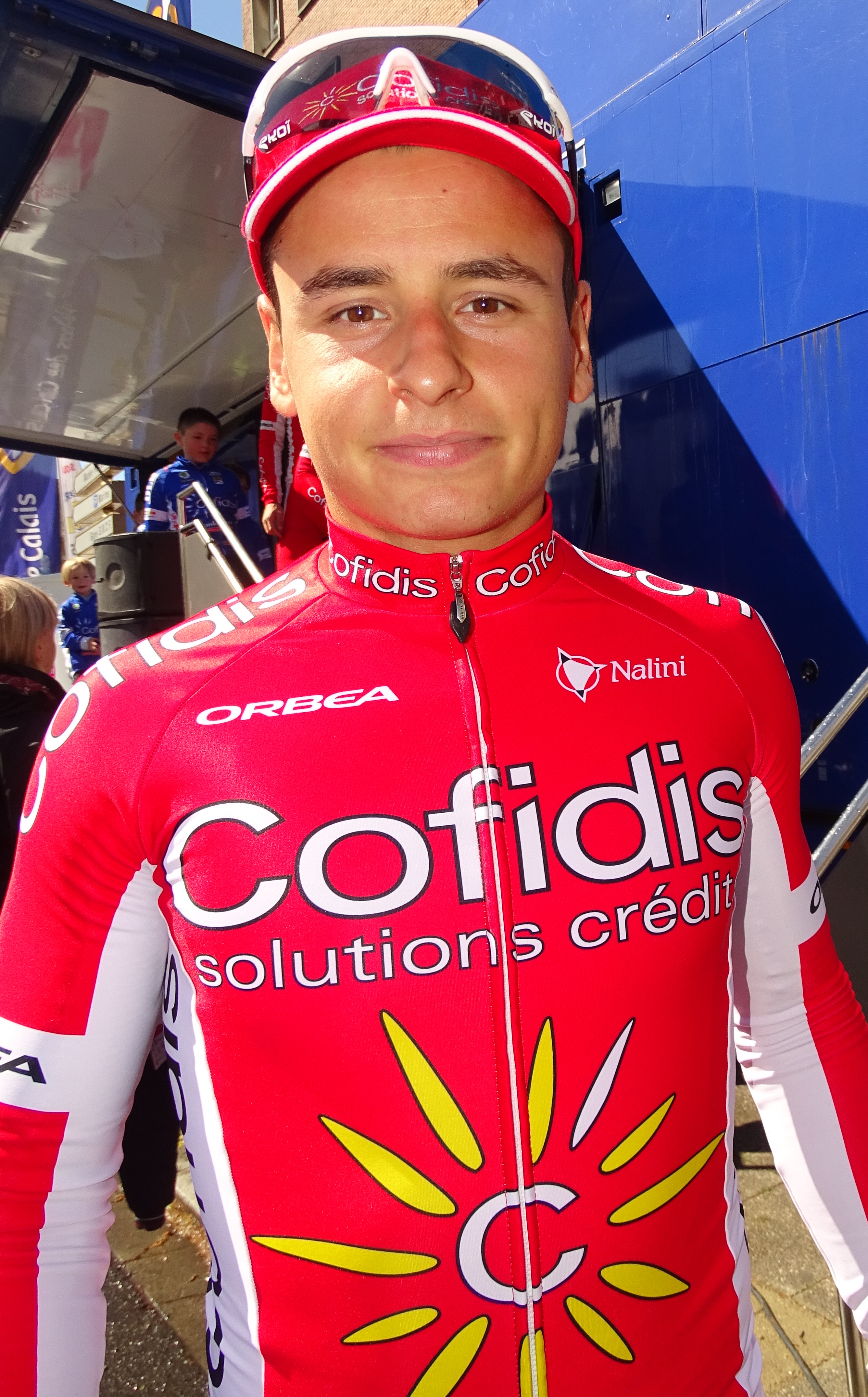 Reportage réalisé le mercredi 6 mai 2015 à l'occasion du départ de la première étape des Quatre jours de Dunkerque 2015 à Dunkerque, Nord, Nord-Pas-de-Calais, France.